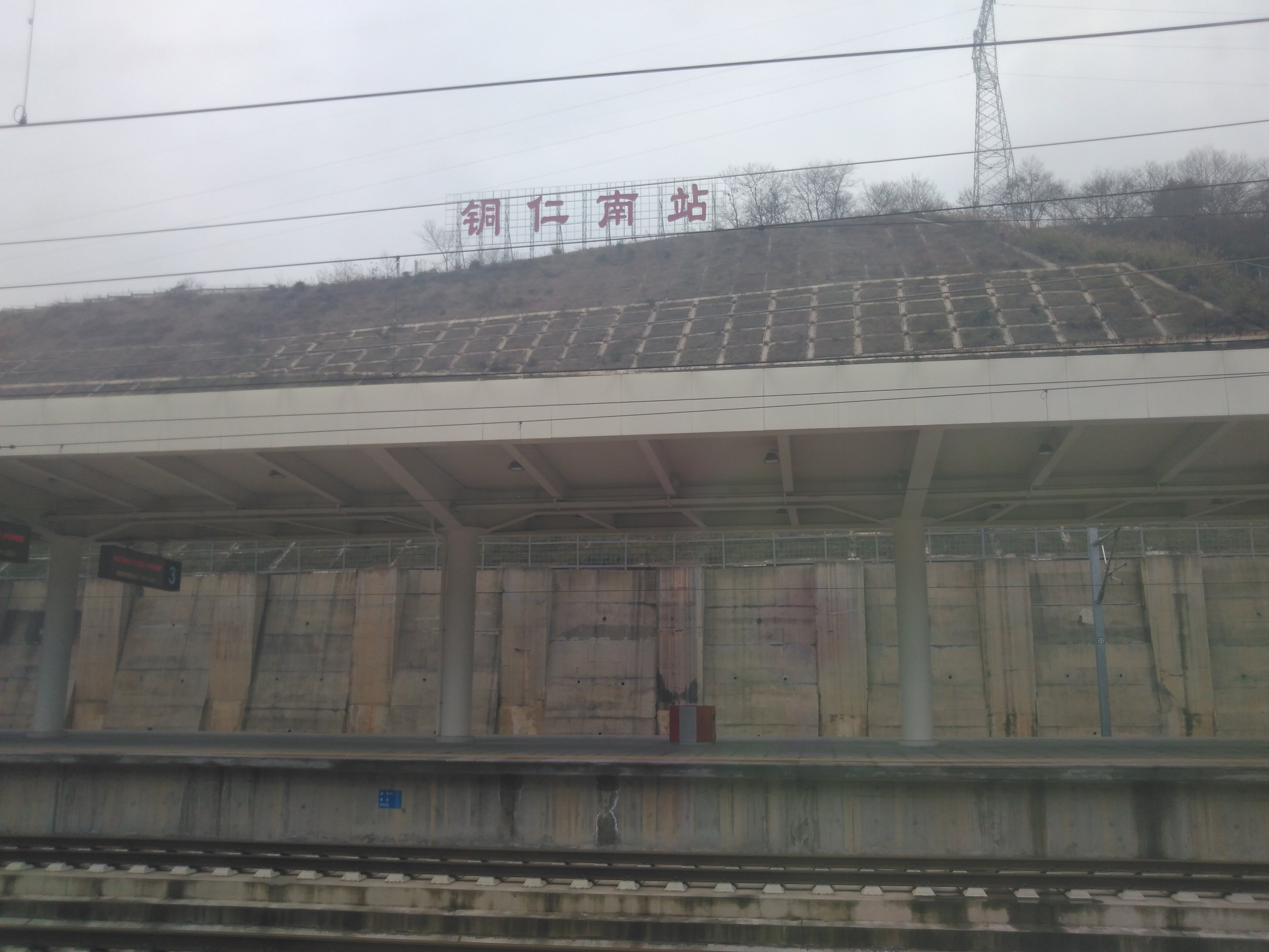 中文（中国大陆）: 沪昆高铁铜仁南站